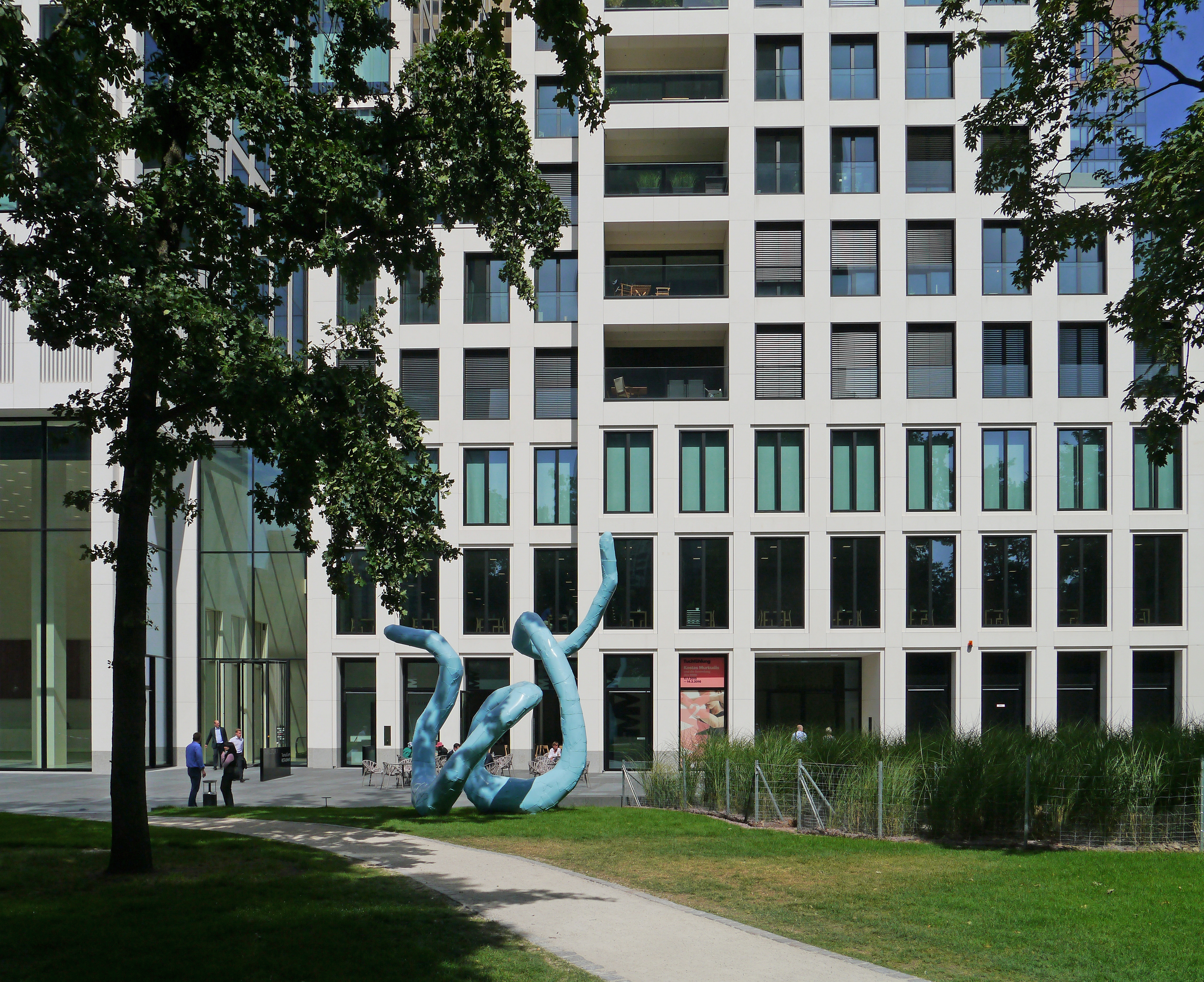 Das MMK2 im Taunusturm, 2015 Eingang von der Gallusanlage in Frankfurt am Main.